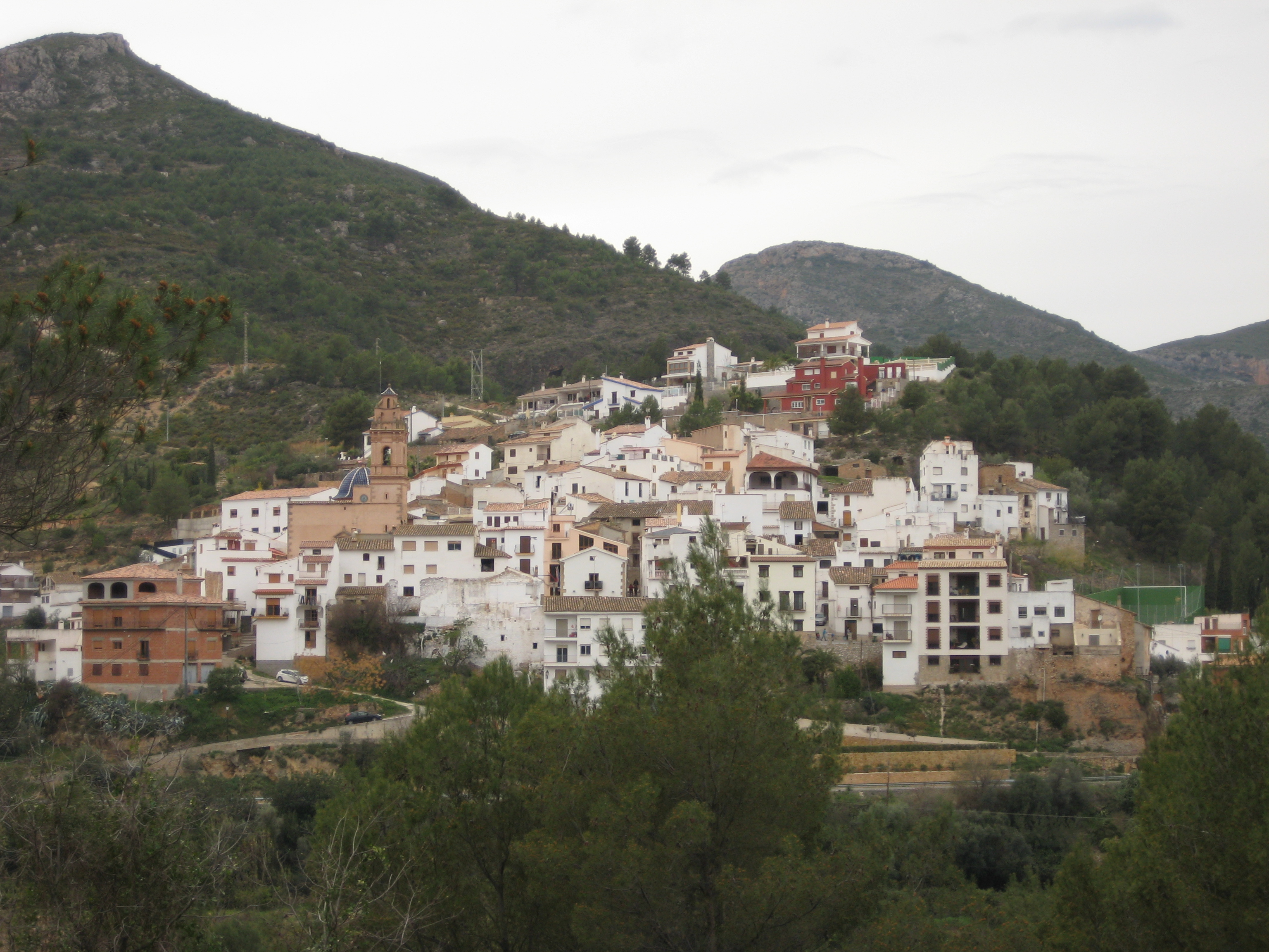 Vista d'Espadella (Alt Millars)